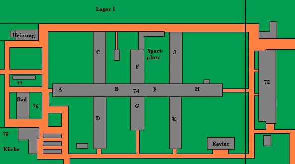 Übersichtskate des Walther-Werkes im KZ Neuengamme 1945